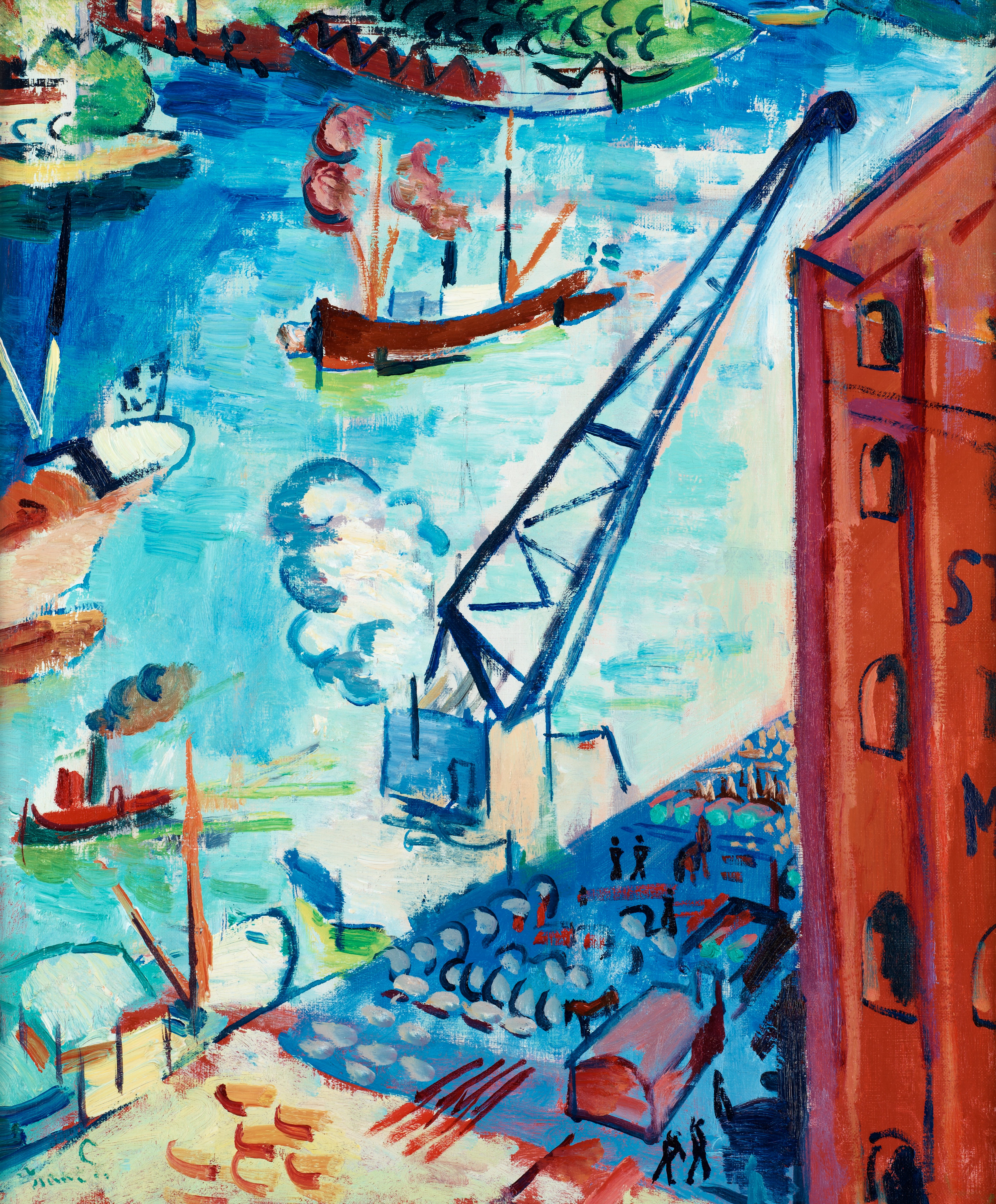 Isaac Grünewald: UTSIKT ÖVER STADSGÅRDEN MOT KASTELLHOLMEN